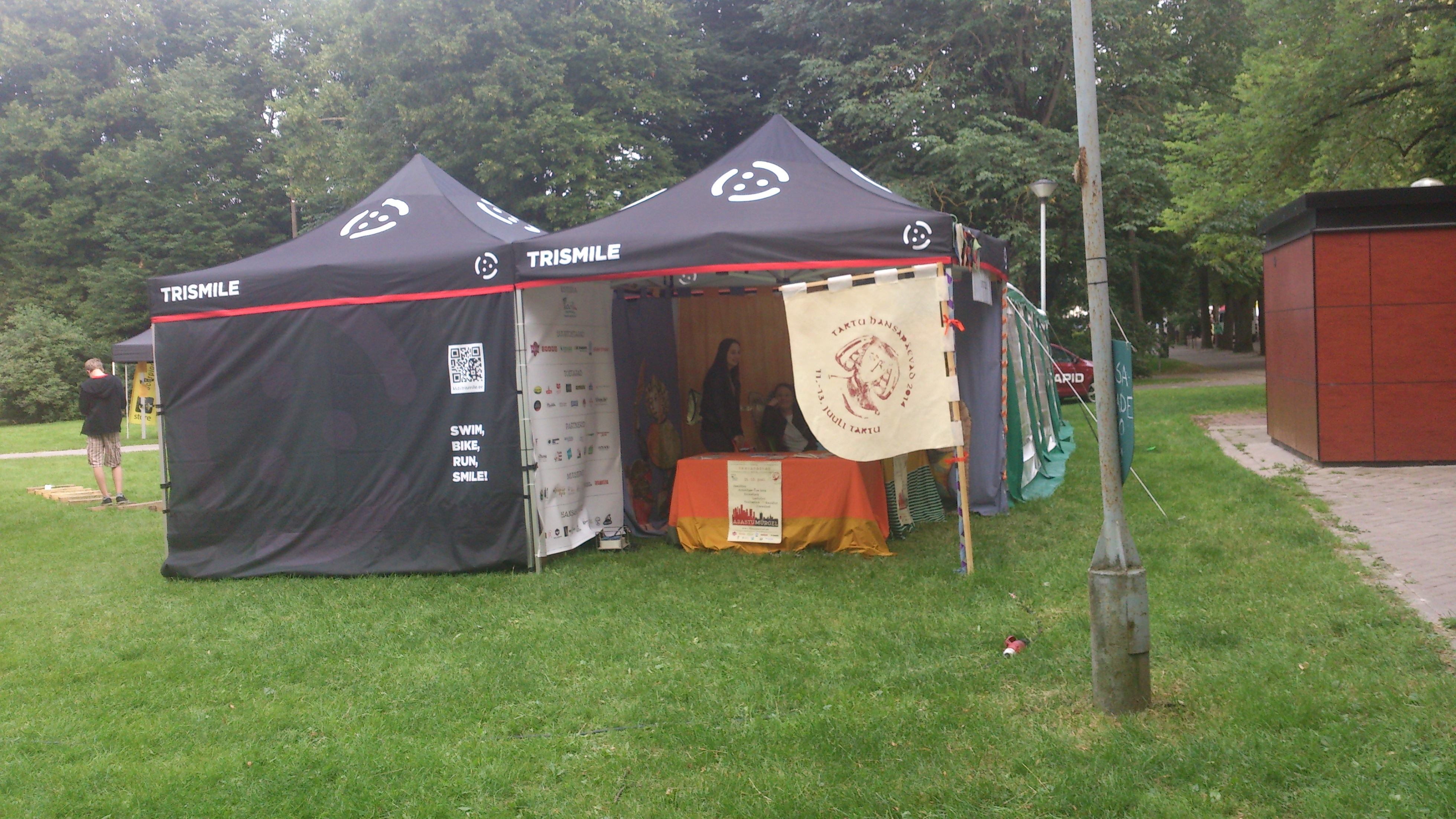 Tartu Mill Triathloni telk Tartu hansapäevadel 2014